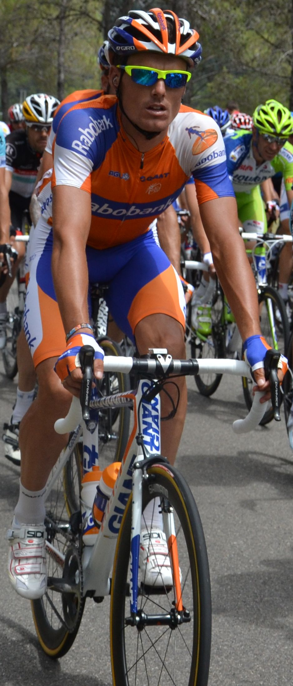 Luis Leon Sanchez lors de la 13e étape du Tour de France 2012.